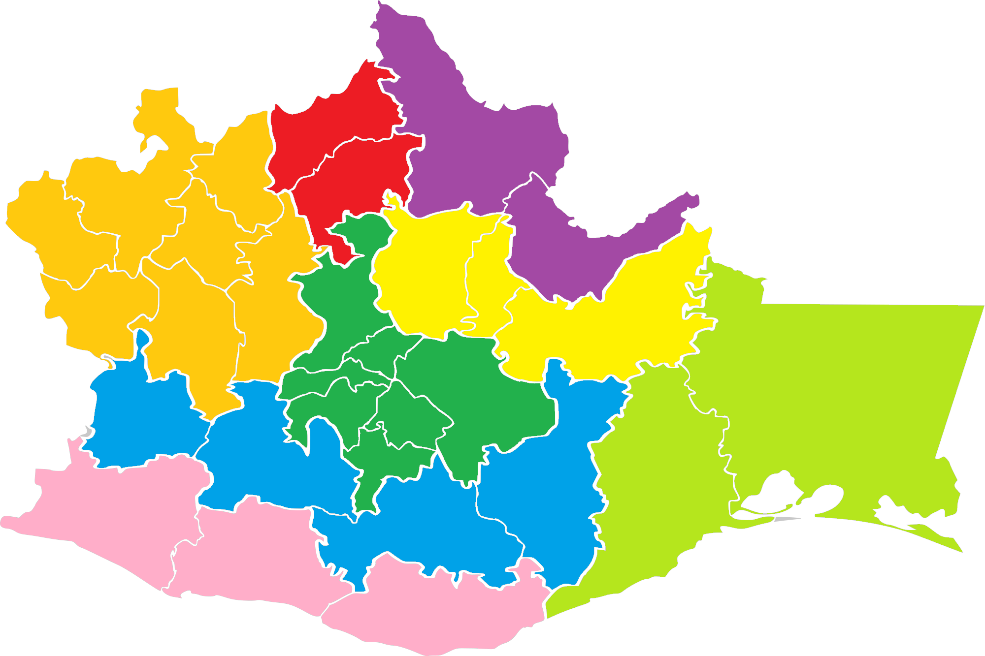 Mapa que muestra al estado mexicano de Oaxaca dividido según sus regiones.